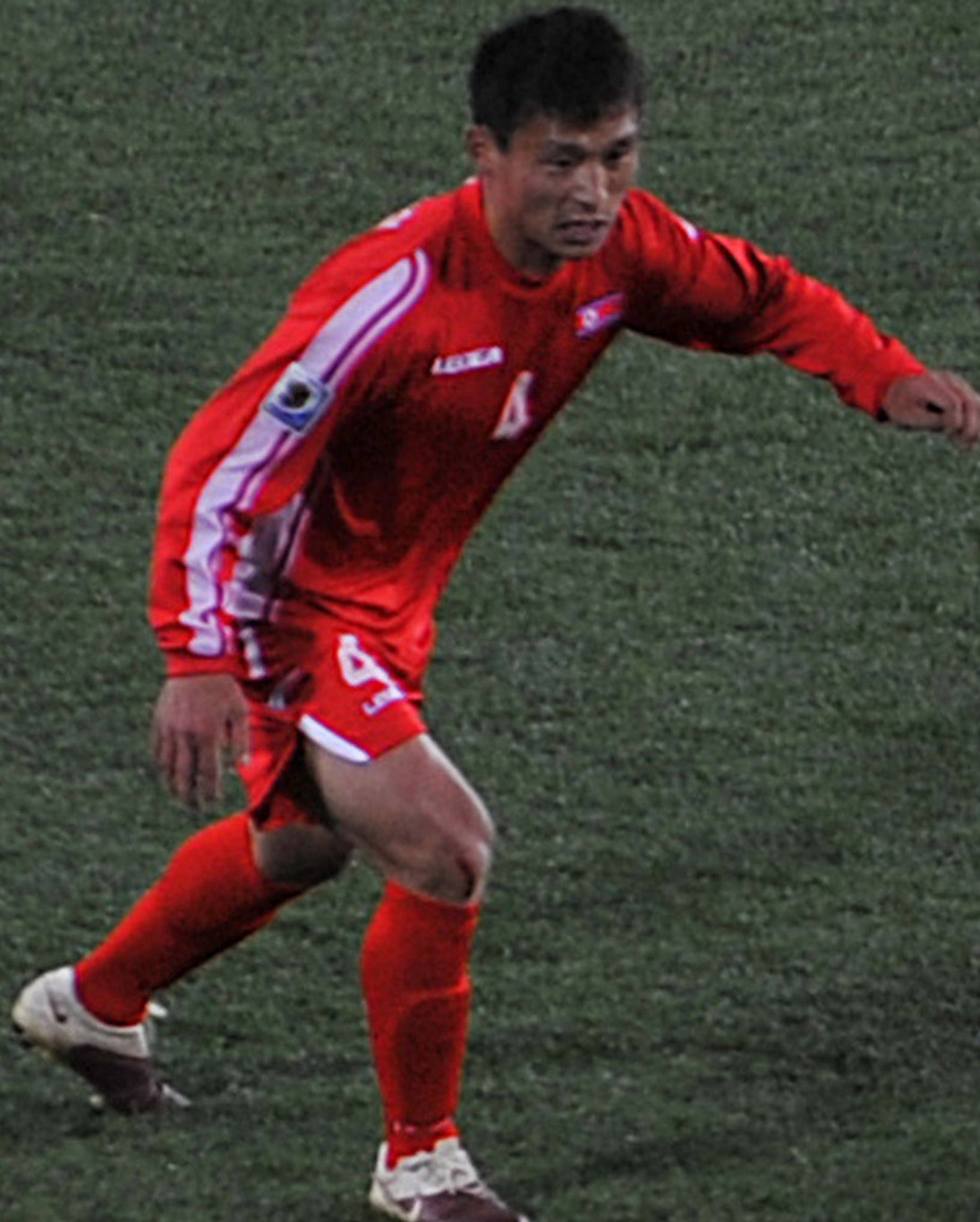 Seleção brasileira estreia na Copa do Mundo de 2010 contra a Coreia do Norte.